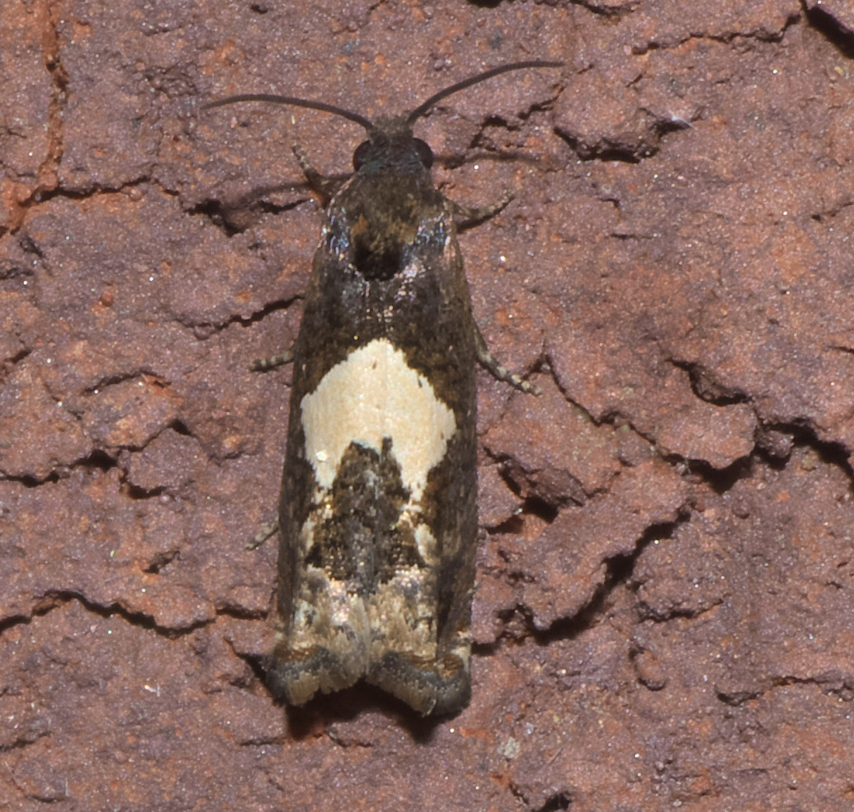 Epiblema otiosana, bidens borer, ID Confidence: 87